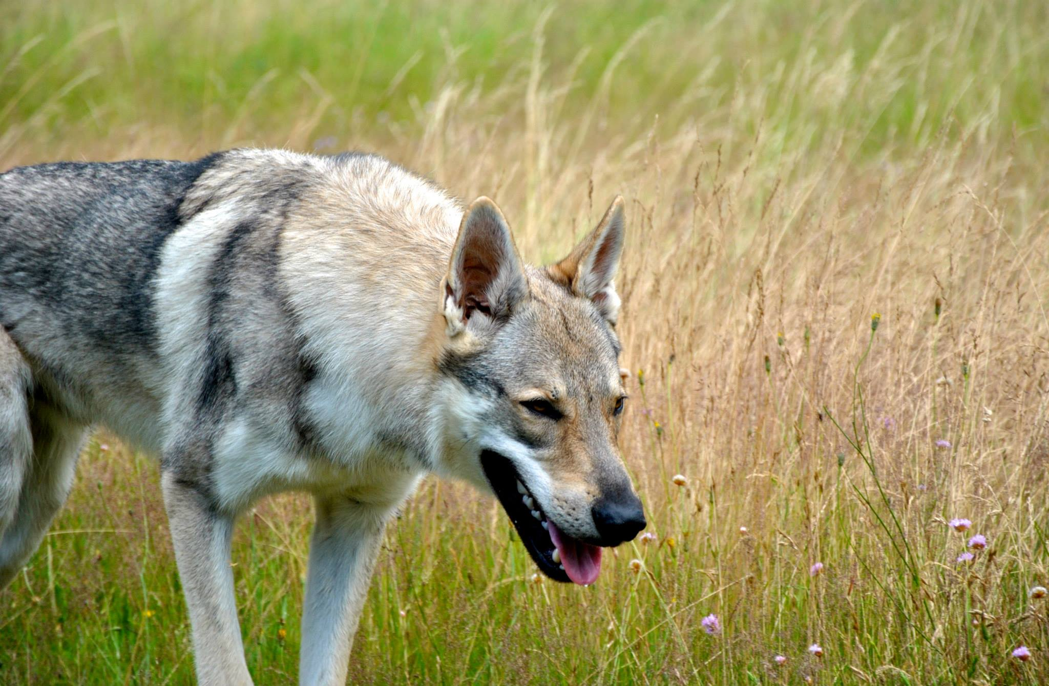 Tschechoslowakischer Wolfhund